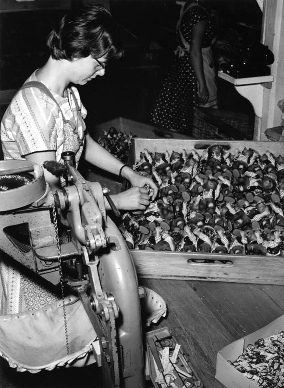 Giengen/Württemberg Firma Steiff GmbH